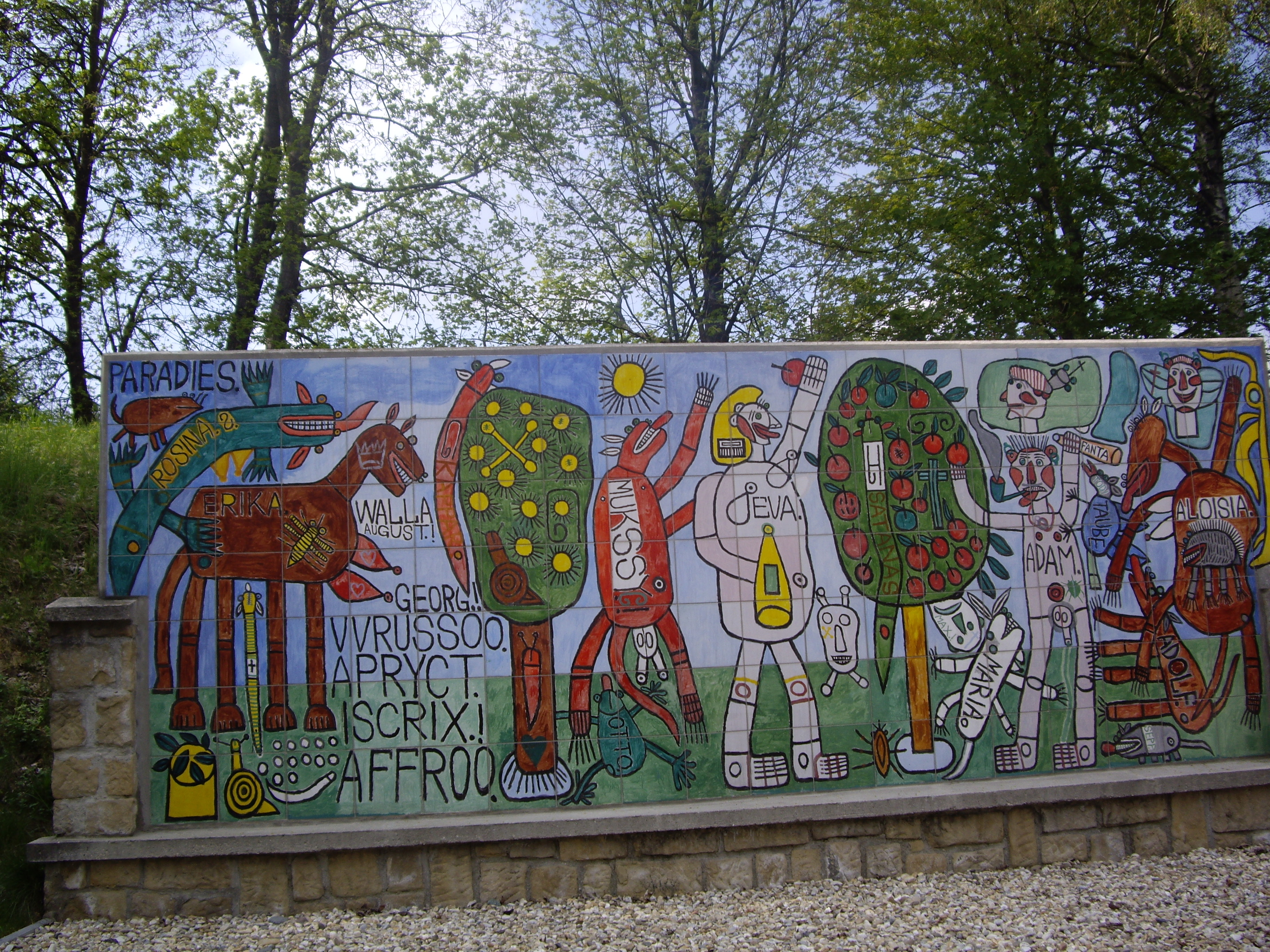 Verko ĉe la parkejo de "muzeo gugging".